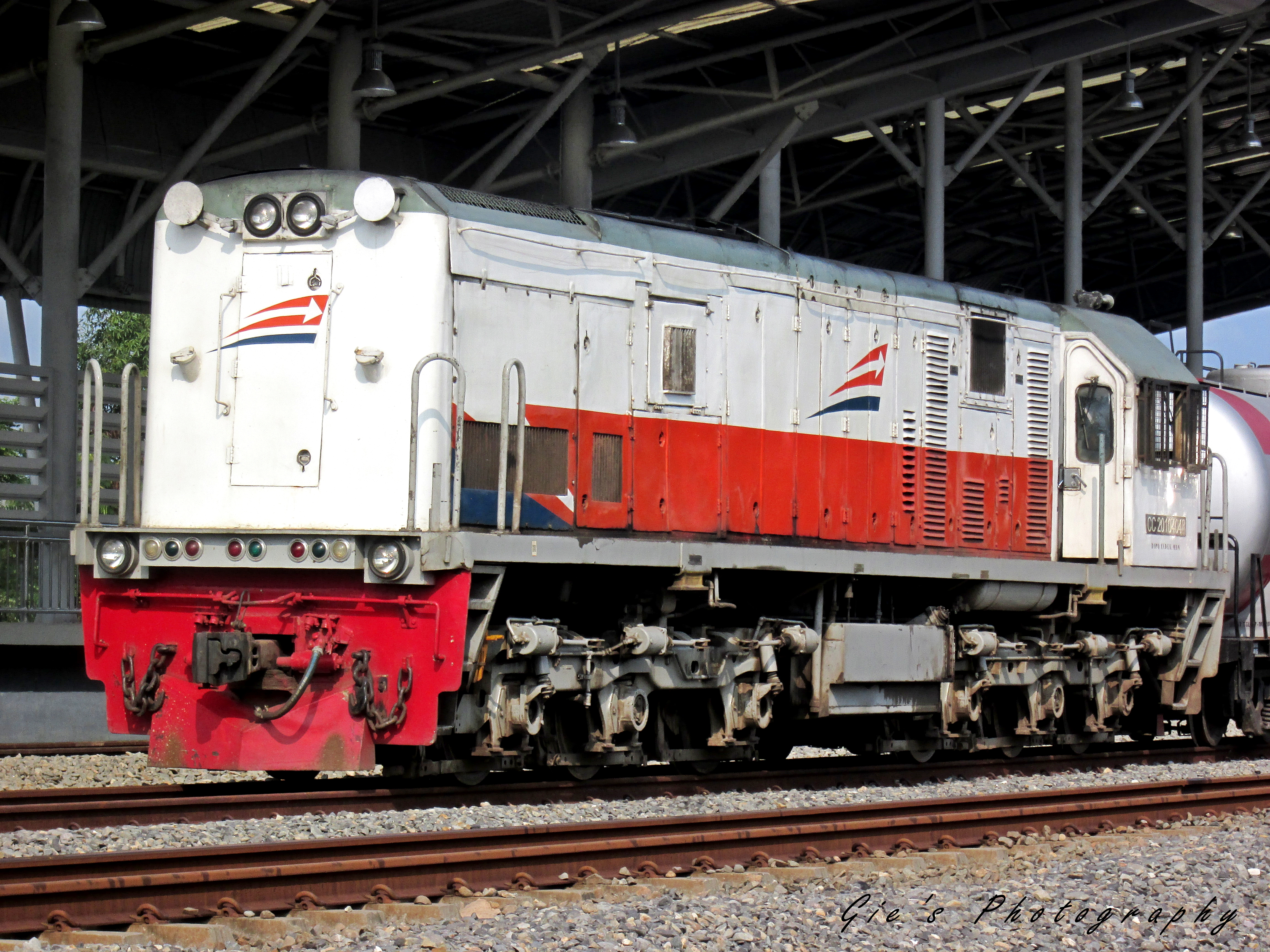 Lokomotif CC 201 141R sedang berdinas KA Pertamina. Kereta berhenti di Stasiun Bandar Khalipah.